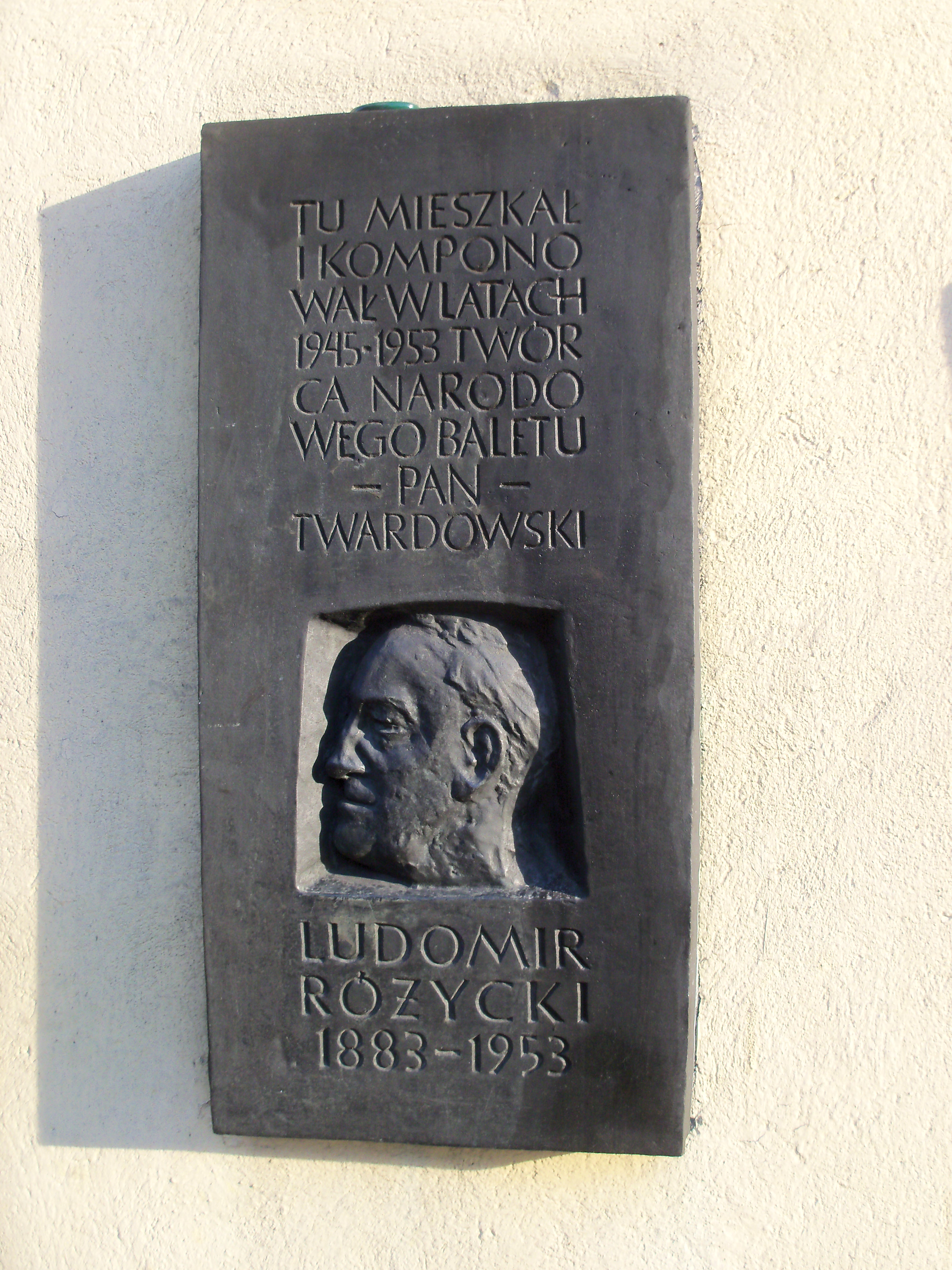 Katowice - tablica przy ul. Sobieskiego 24, poświęcona Ludomirowi Różyckiemu